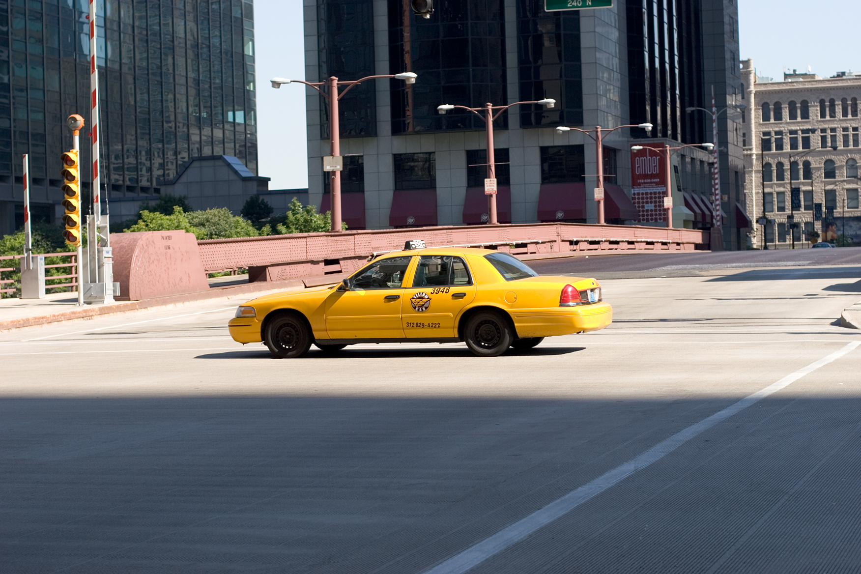 Chicago cab, IL, USA.